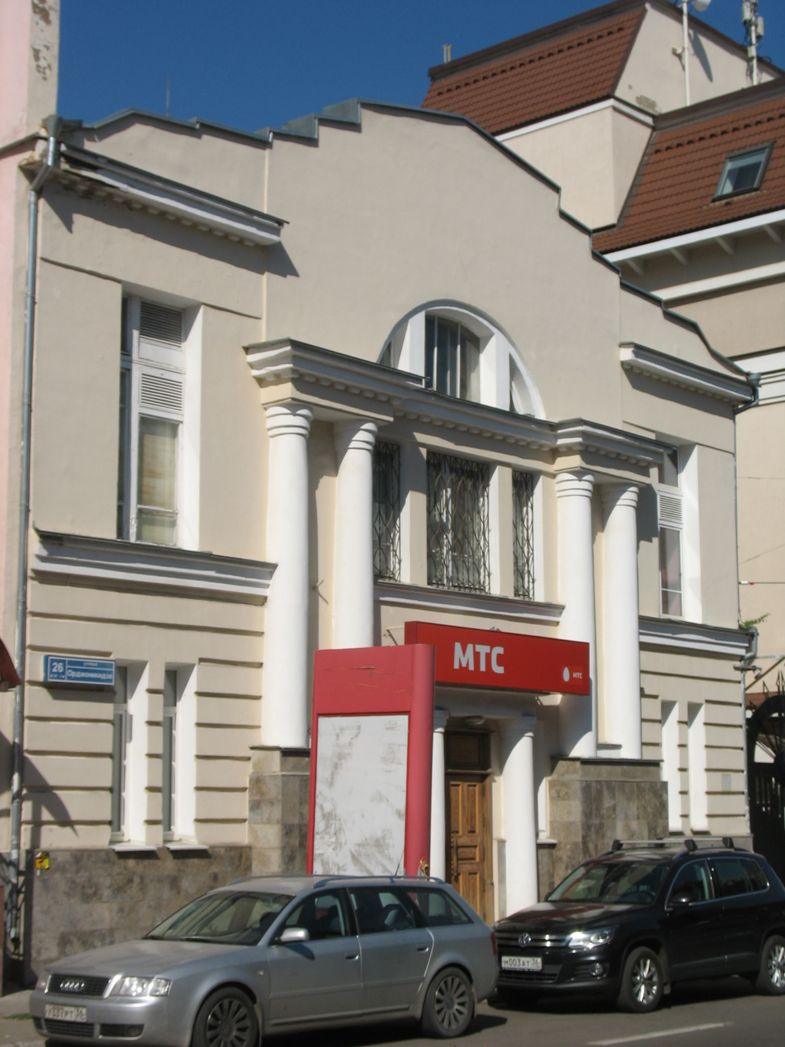 Рисовальная школа им. Пономаревых / Мастерские, где работал А.А. Бучкури: улица Орджоникидзе, 26, Воронеж, Воронежская область